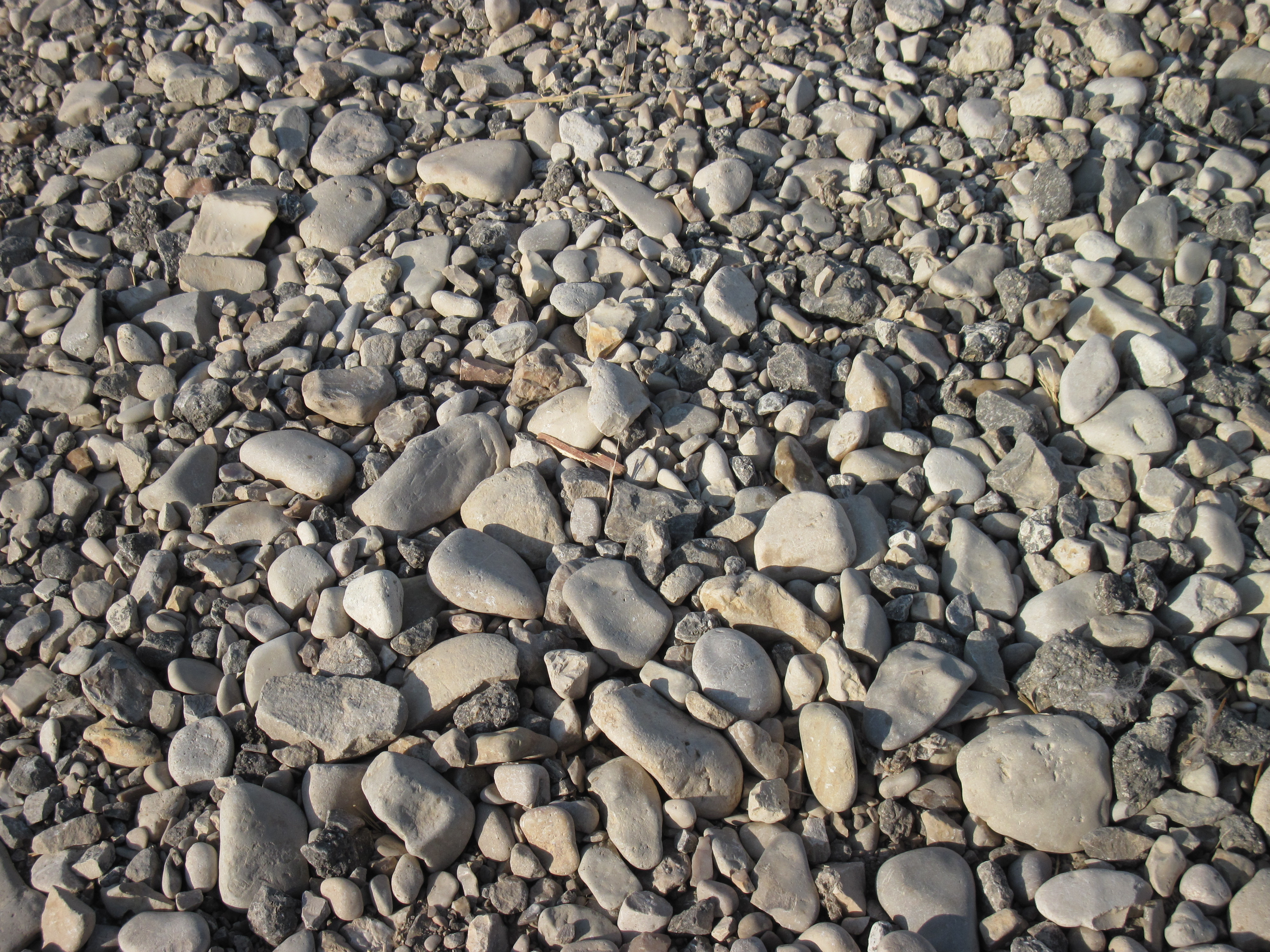 חלוקי נחל בסמוך לים המלח